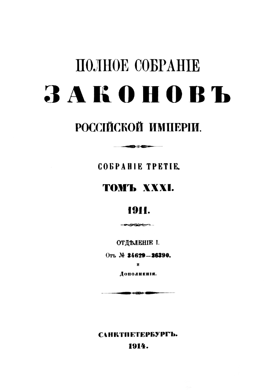 Титульная страница XXXI тома «Полного собрания законов Российской империи», выпущенного в 1914 году